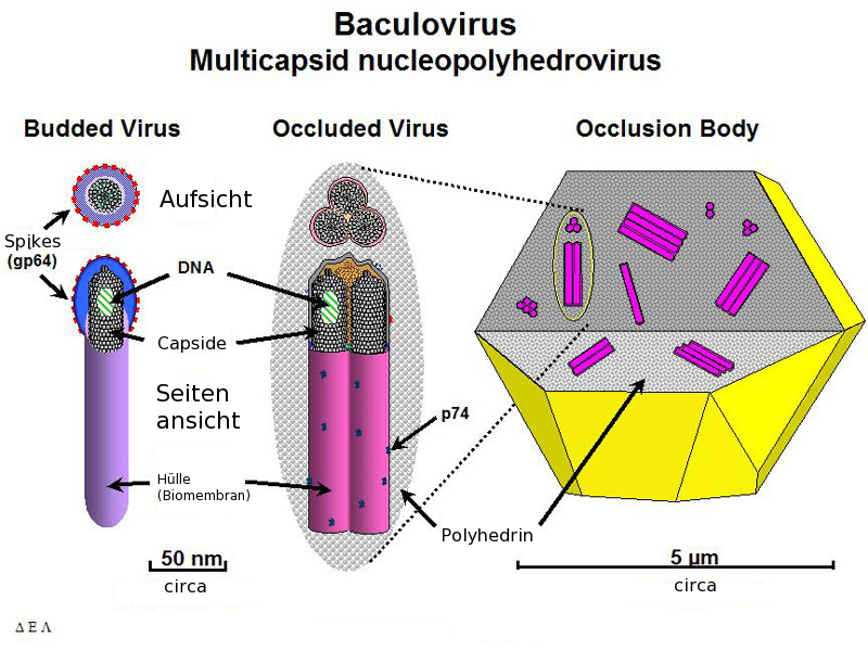 Nucleopolyhedrovirus overwie german